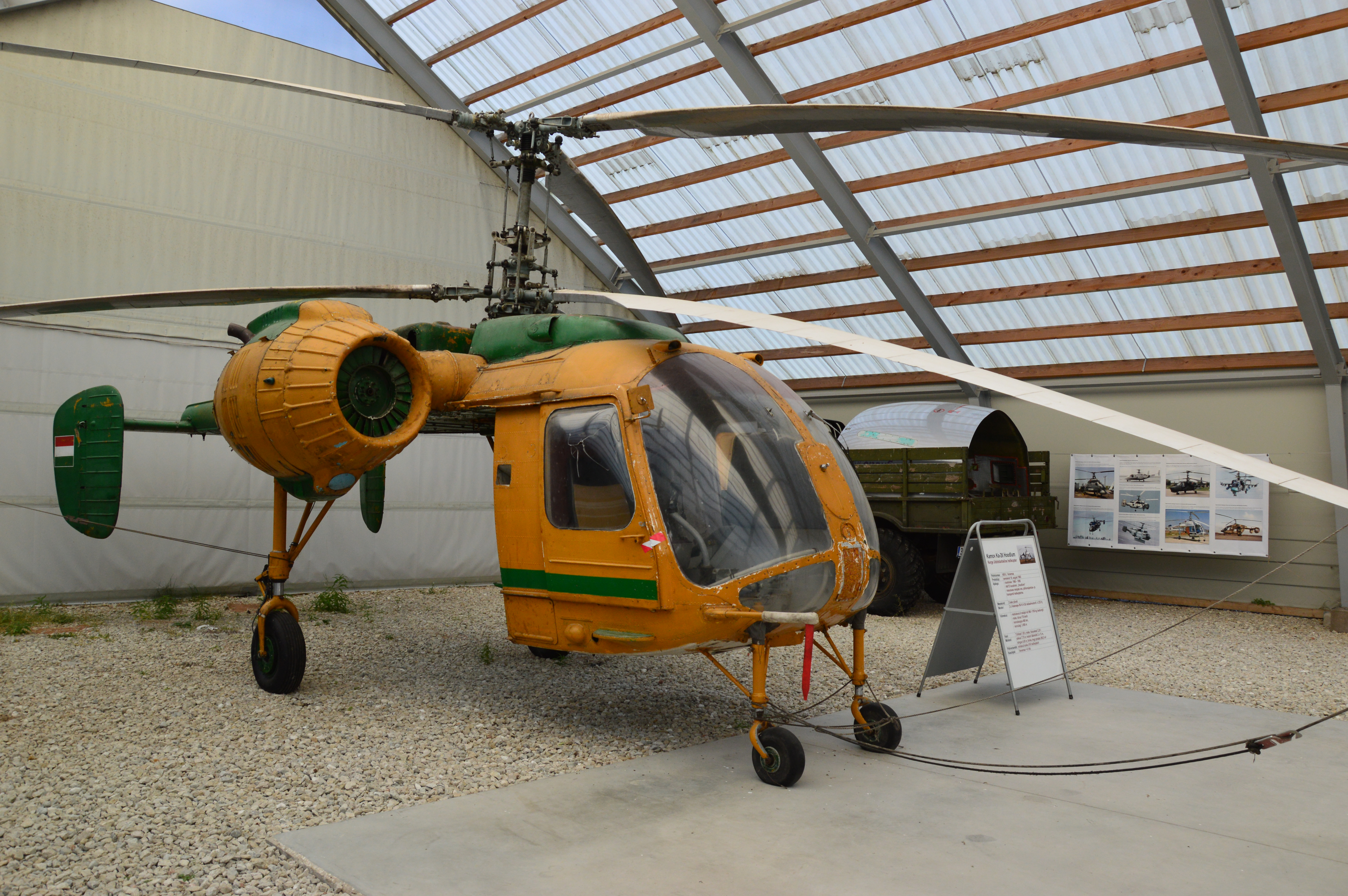 Kamov Ka-26 Eesti Lennundusmuuseumis.